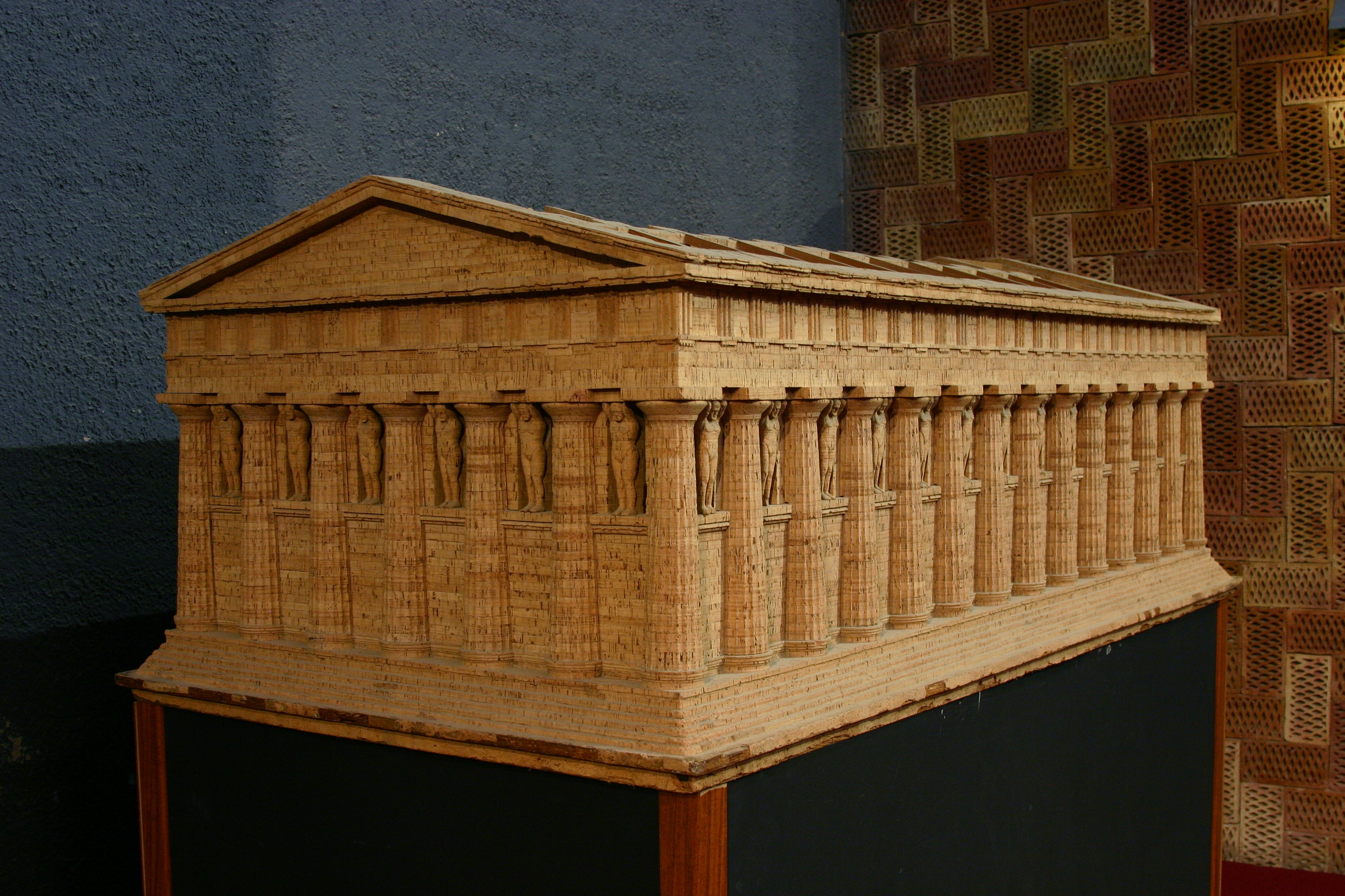 Museo Archeologico Regionale